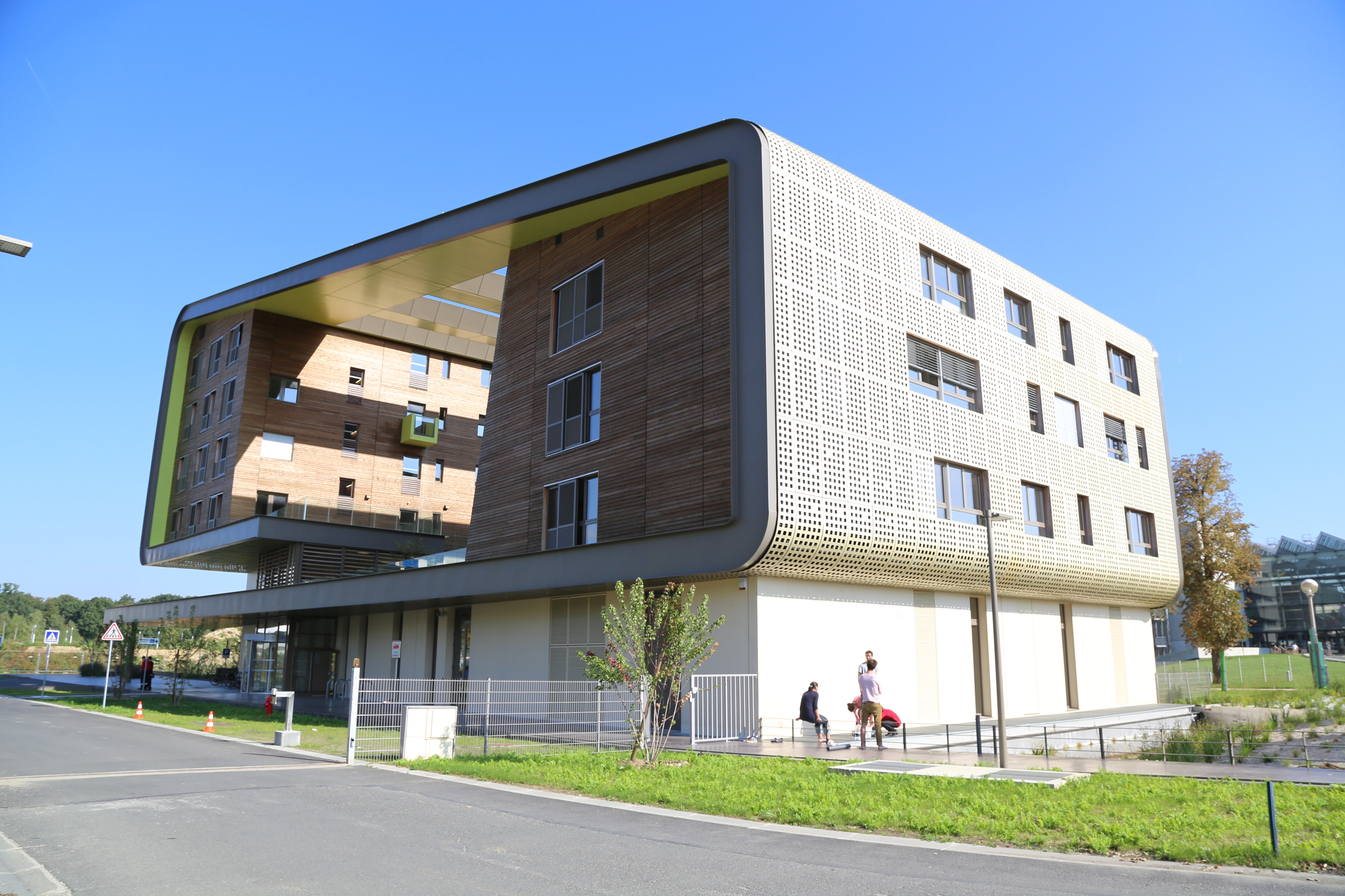 d.school